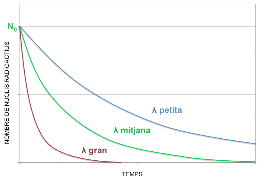 Esquema de la Llei de la Desintegració segons la magnitud de la constant de desintegració.